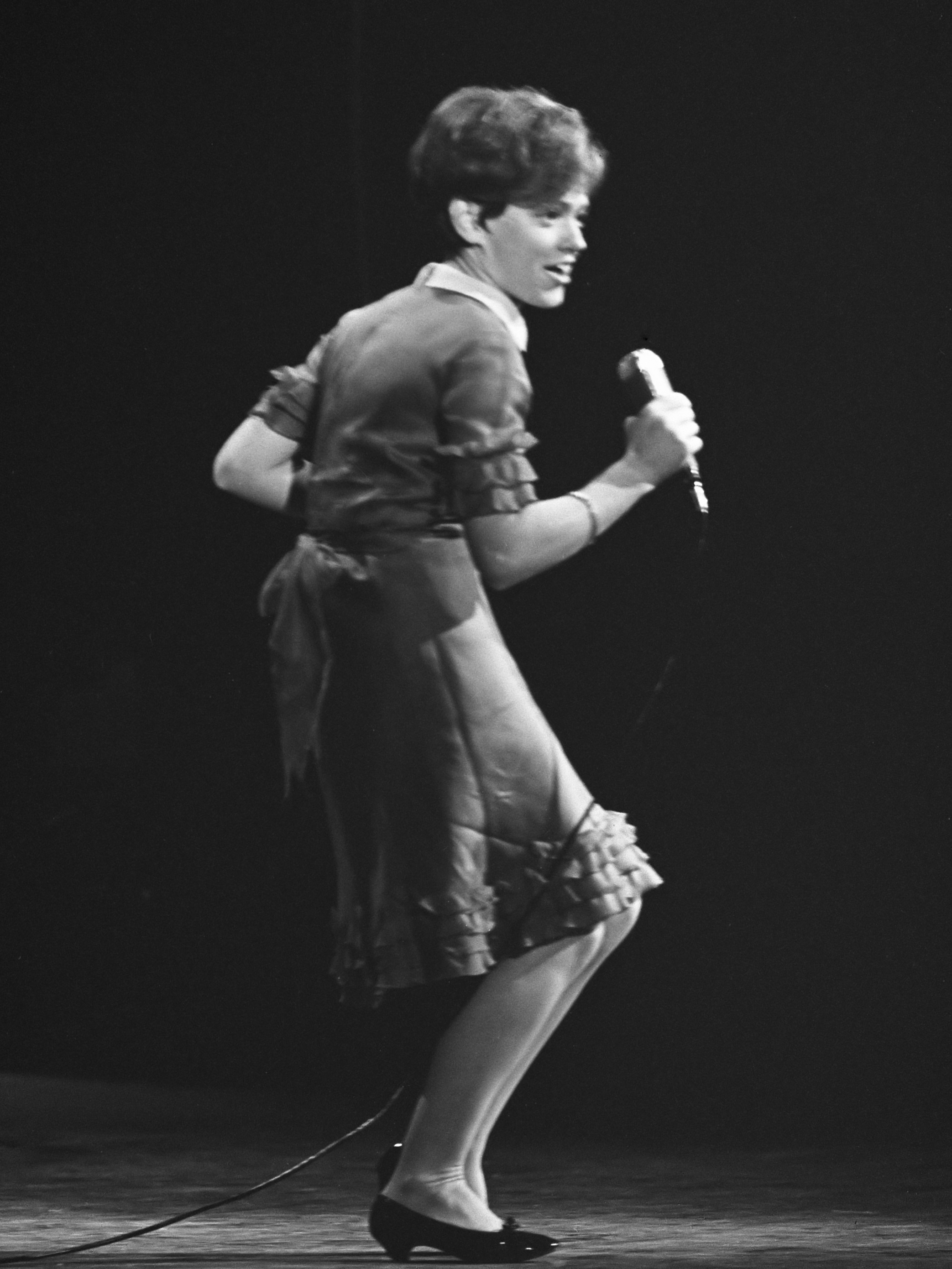 Grand Gala du Disque 1965 , Rita Pavone 2 oktober 1965